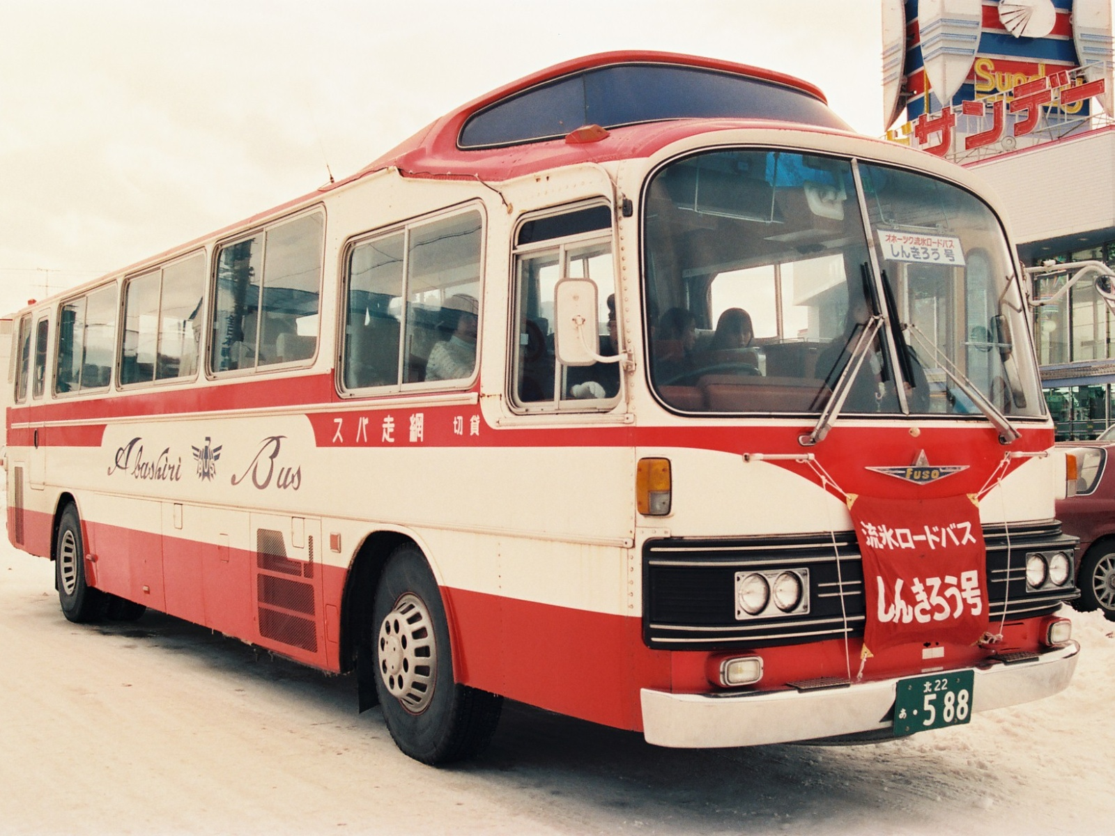 網走バス「しんきろう号」（紋別市内にて）。 網走バス「しんきろう号」（紋別市内にて）。